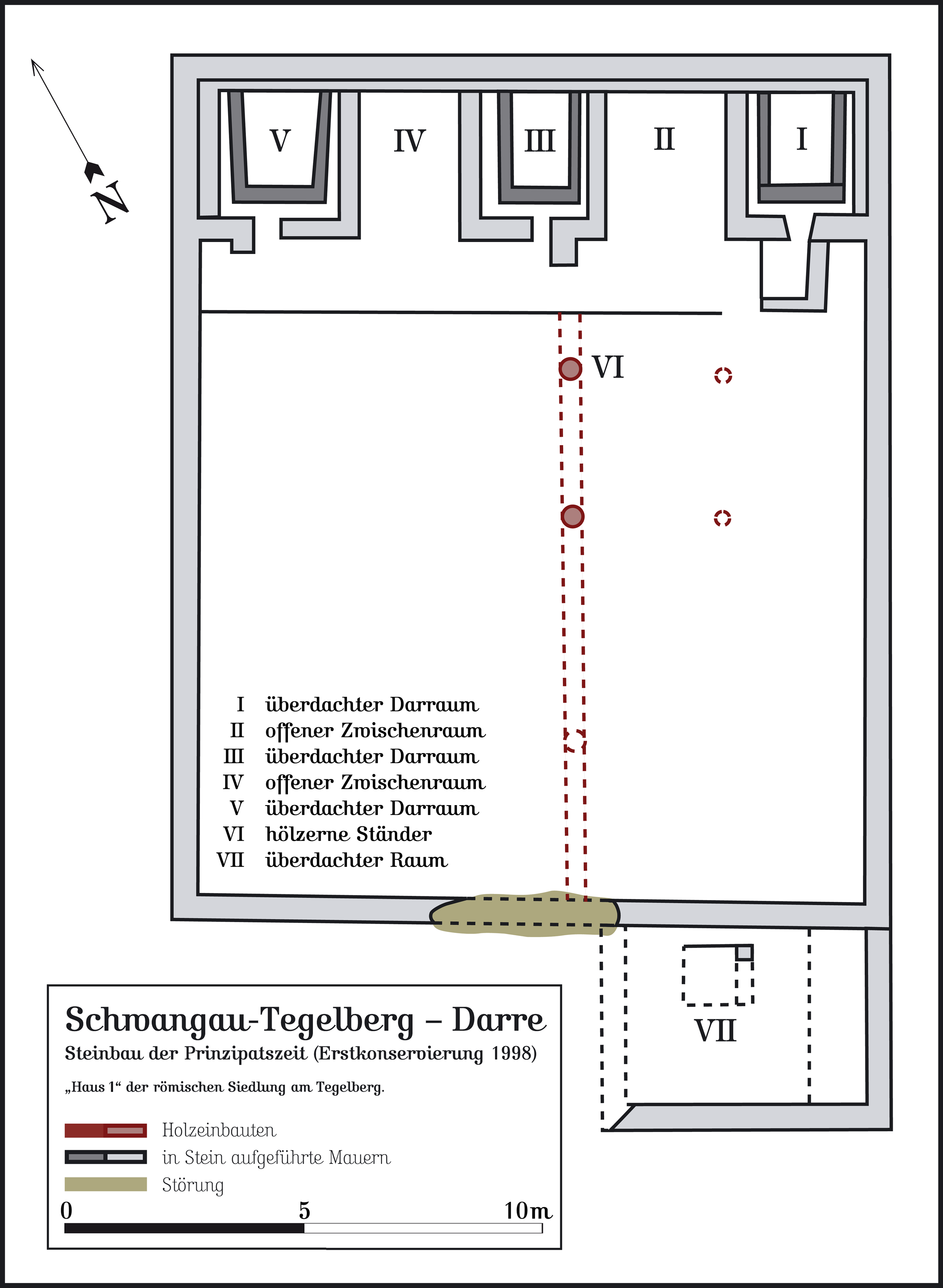 1998 am Tegelberg bei Schwangau, Oberbayern, konserviertes römisches Wirtschaftsgebäude, höchstwarscheinlich eine Darre.